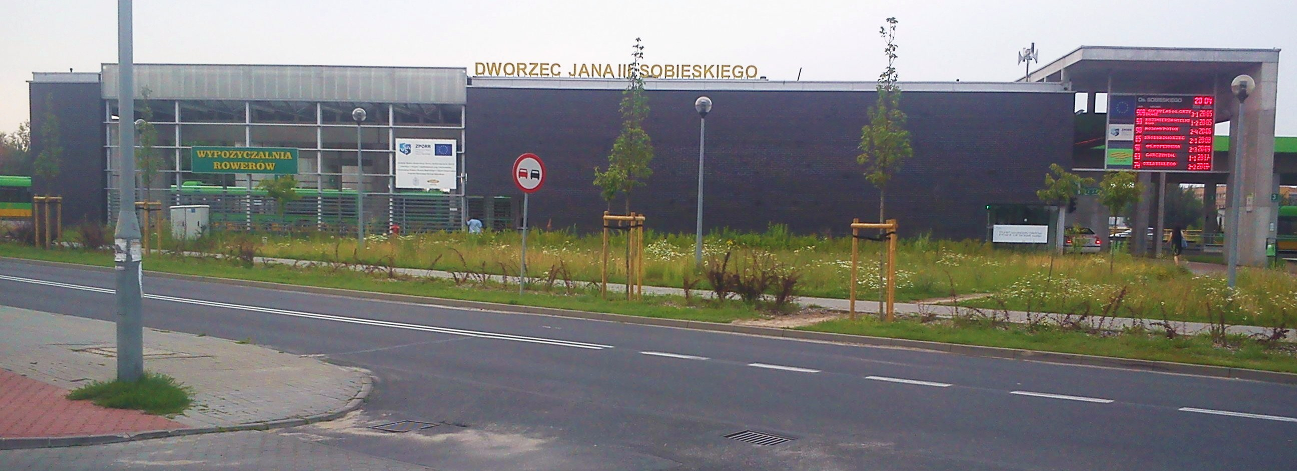 Dworzec Jana III Sobieskiego (autobusowy) - Poznań.